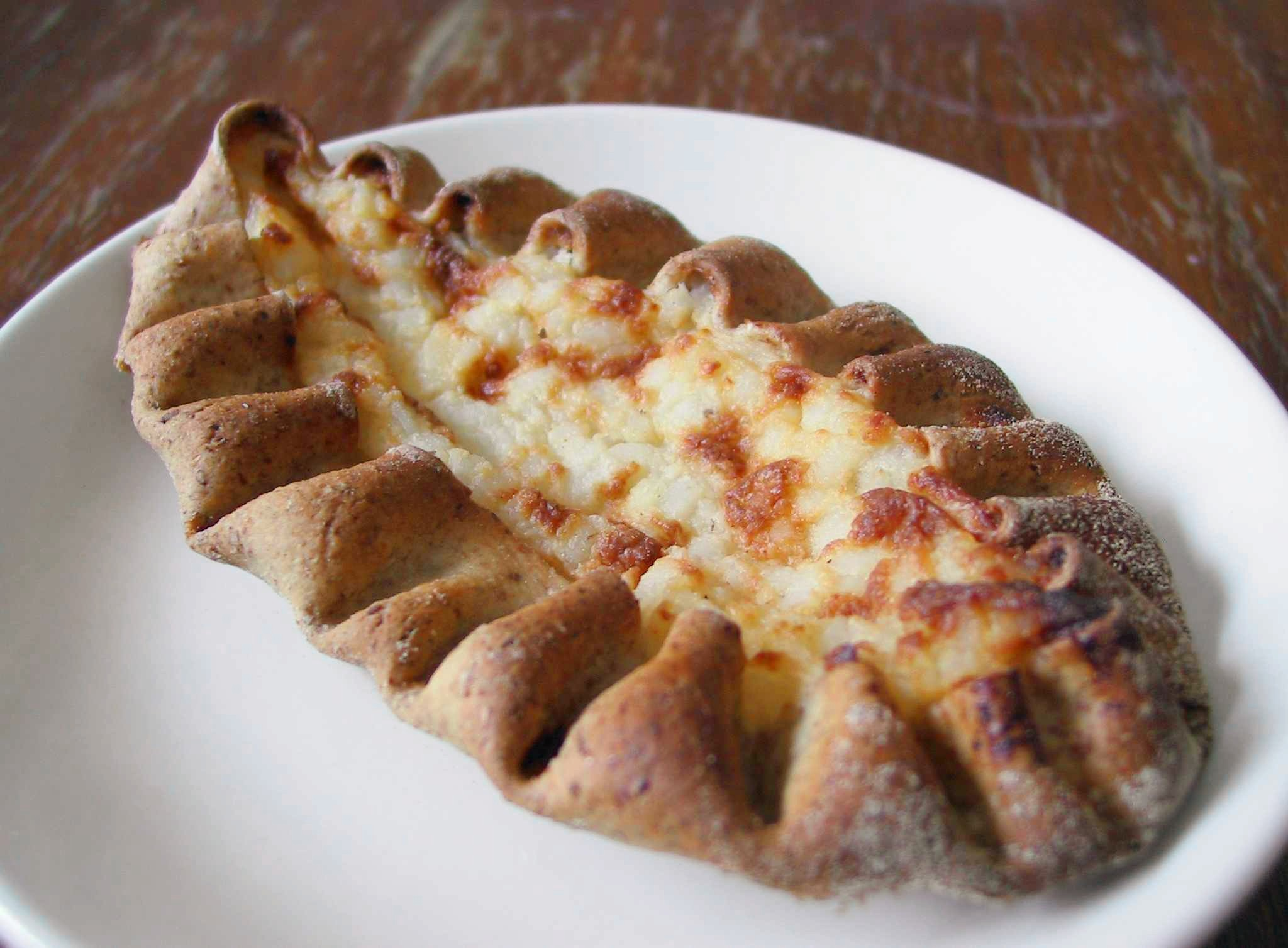 Karjalanpiirakka, made by Leipomo Eho (a bakery in Helsinki)